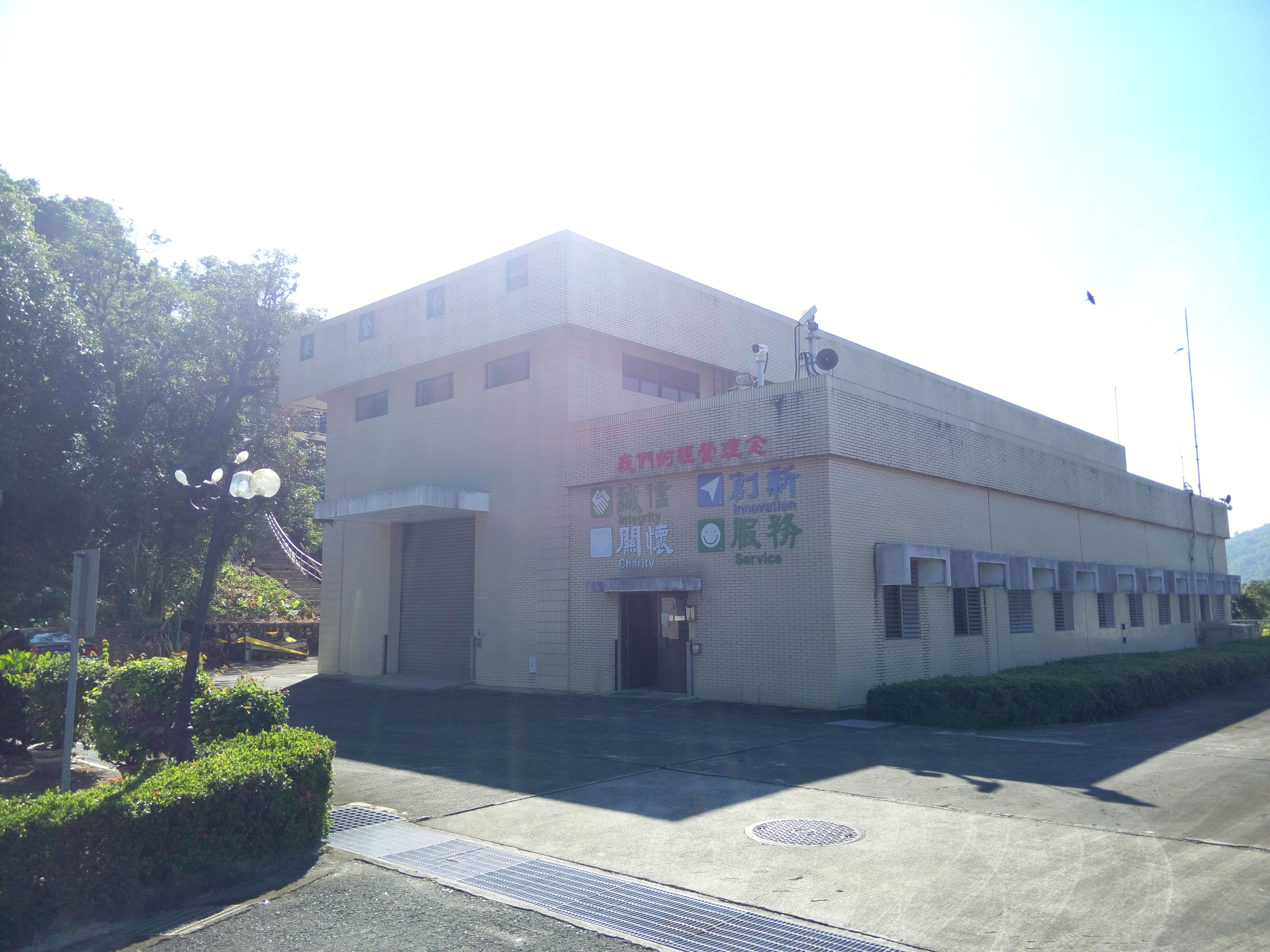 臺灣電力公司高屏發電廠六龜機組